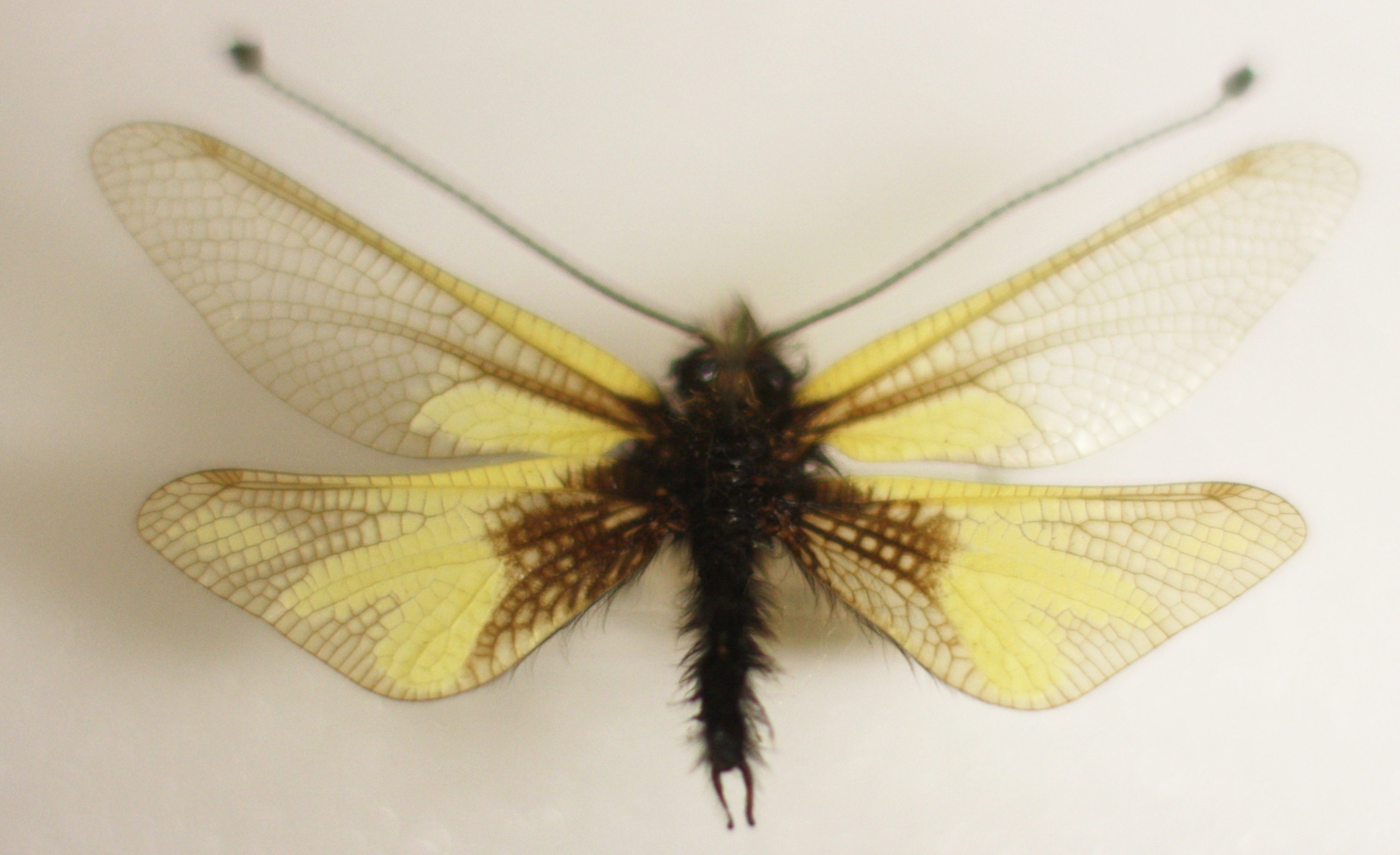 Naturkundliche Sammlung Übermaxx Überseenuseum Bremen; Schmetterlinge und andere